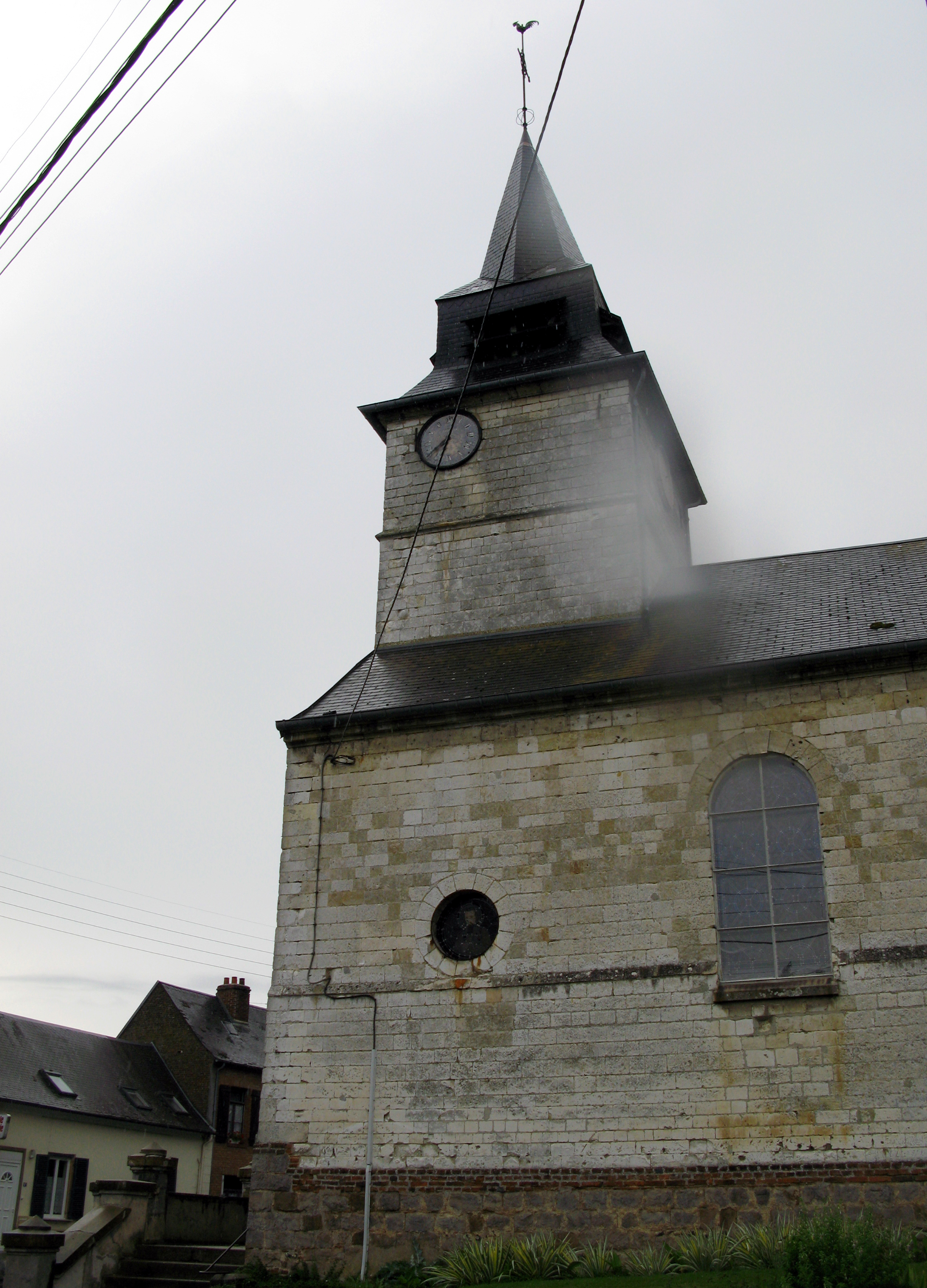 Acheux-en-Amiénois (Somme, France) - L'église vue en venant d'Albert. De nombreux fils électriques aériens gênent pour un "cadrage" satisfaisant de la photo. Il a été volontairement choisi de ne pas les estomper afin de mieux documenter et dater la prise de vue. (La photo a été prise sous la pluie, ce qui explique le flou sur la partie droite du clocher : une goutte d'eau sur l'objectif est la cause de ce manque de netteté.)